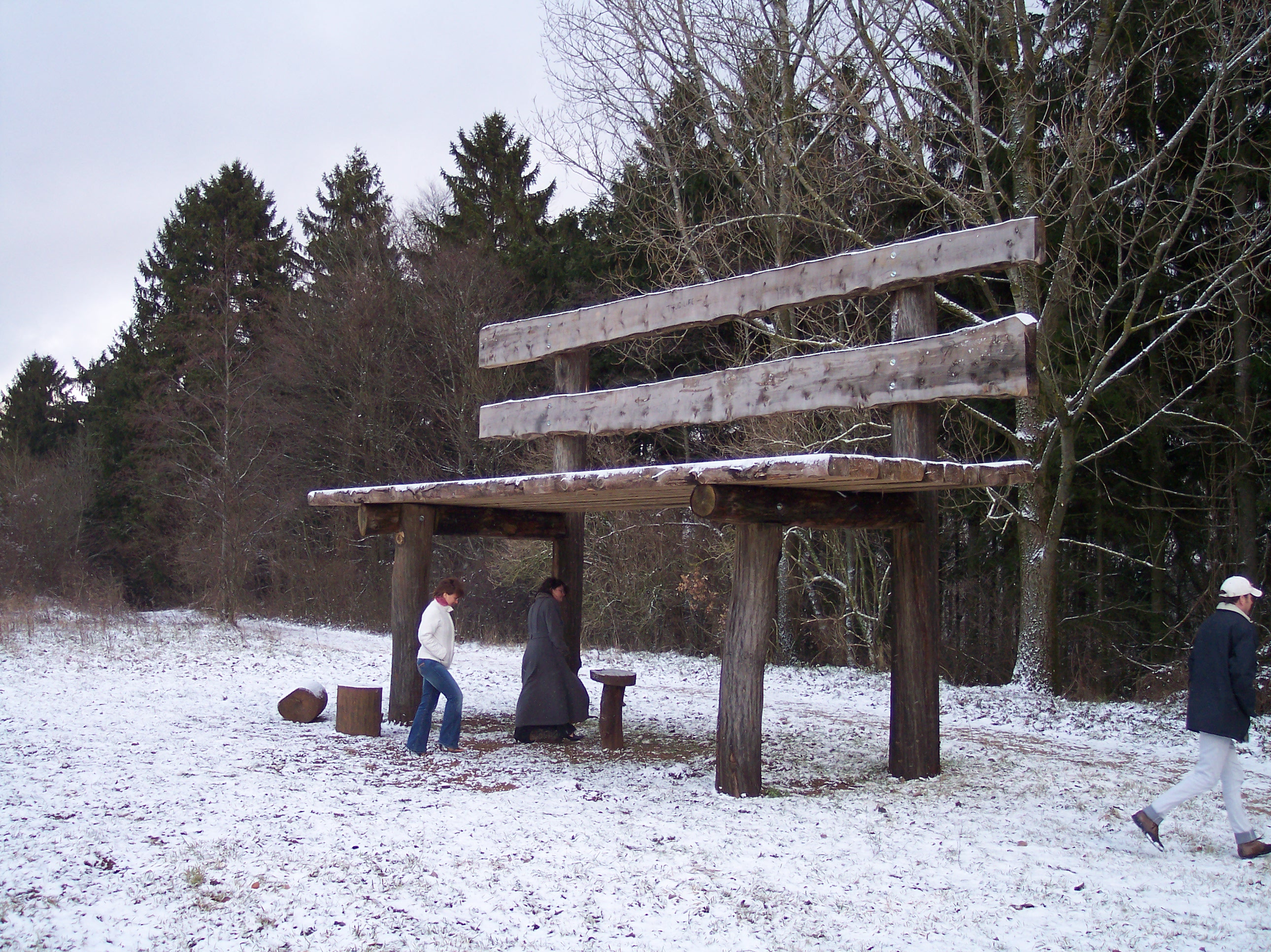 Gaalgebierg in de winter. Foto: Henri van Zeeland